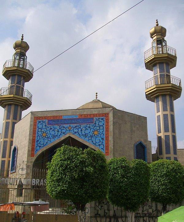 Mesquita do Brás, no bairro homônimo de São Paulo.